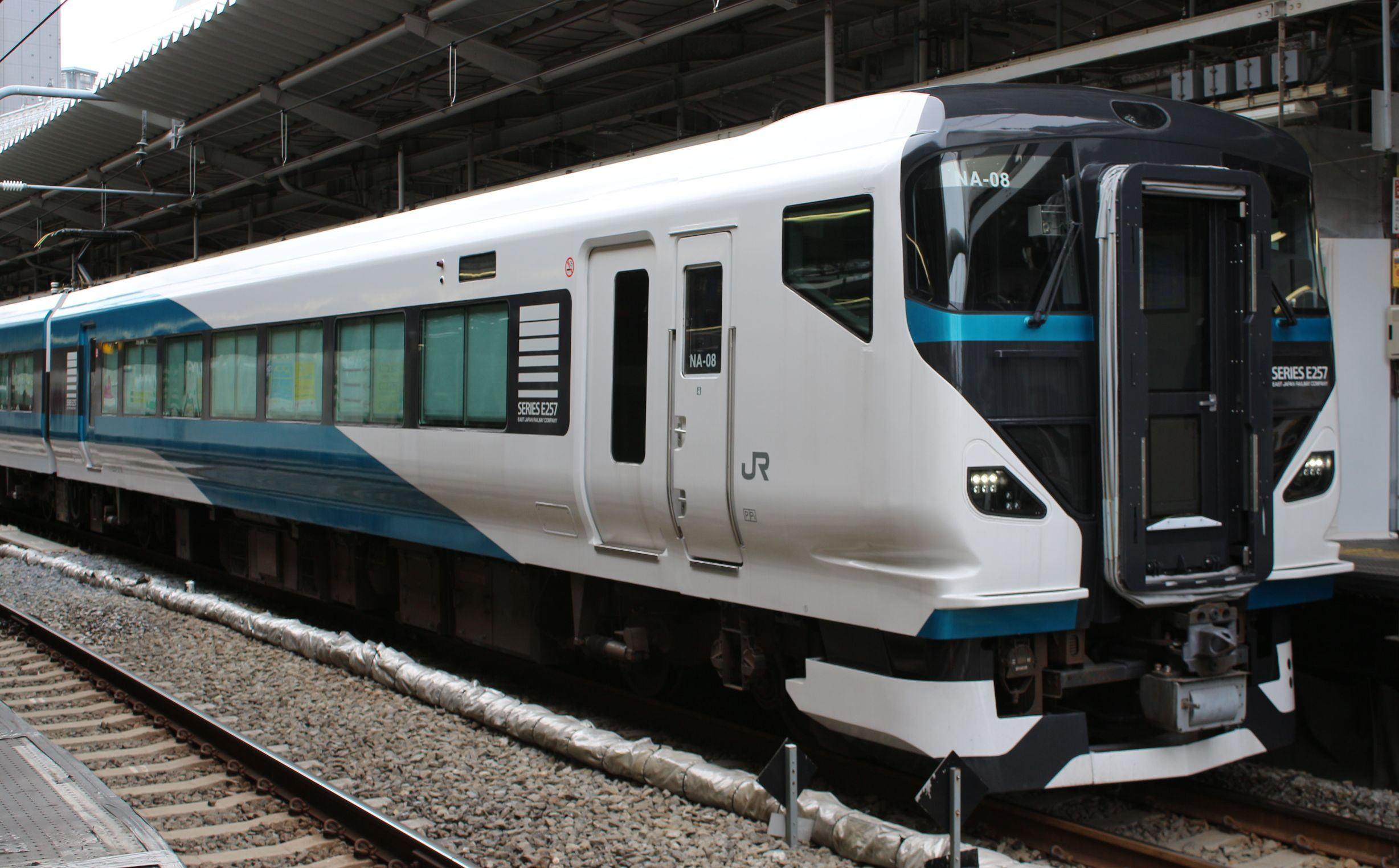 JR東日本クハ257-2110 (新宿駅にて)